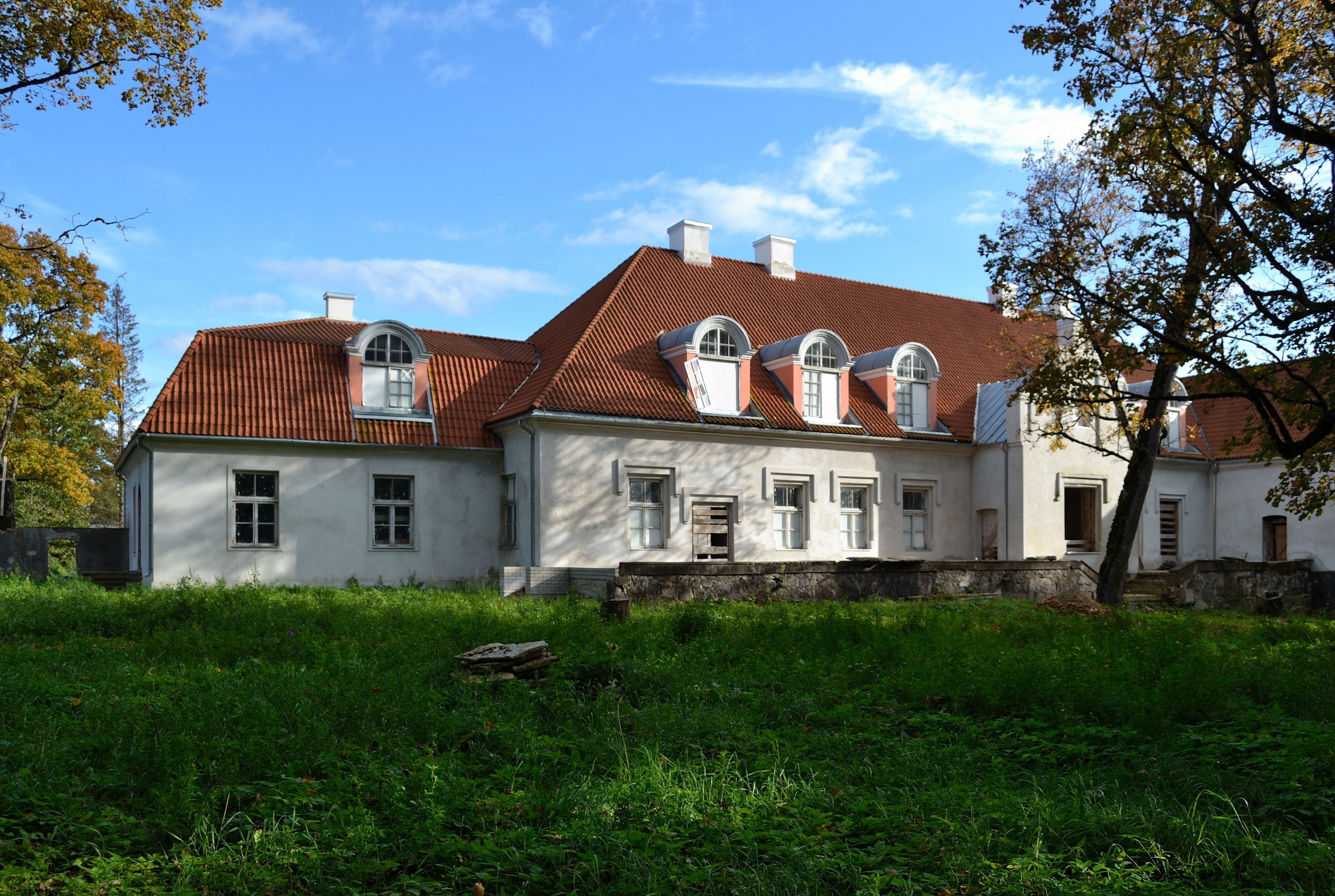 Ingliste mõisa peahoone